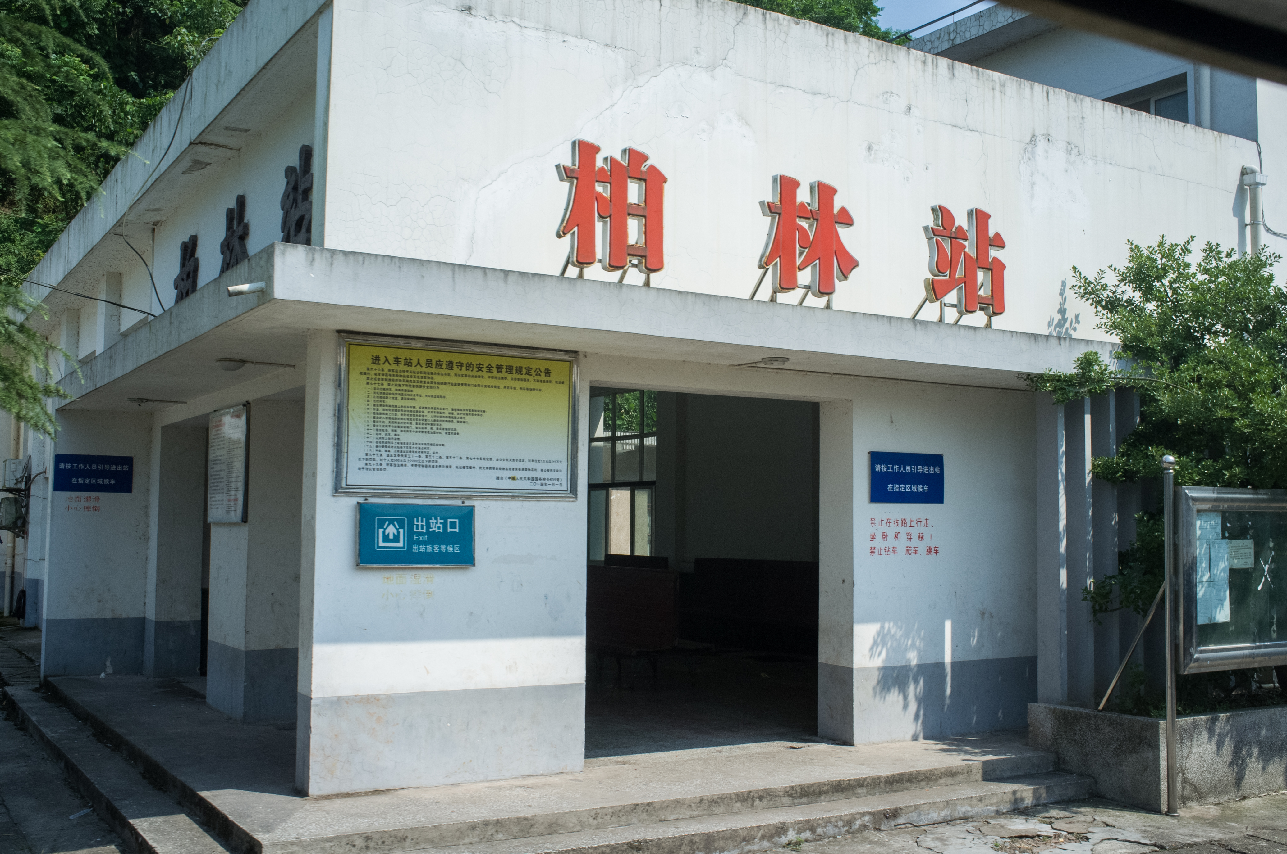 中文（中国大陆）: 成渝铁路柏林站